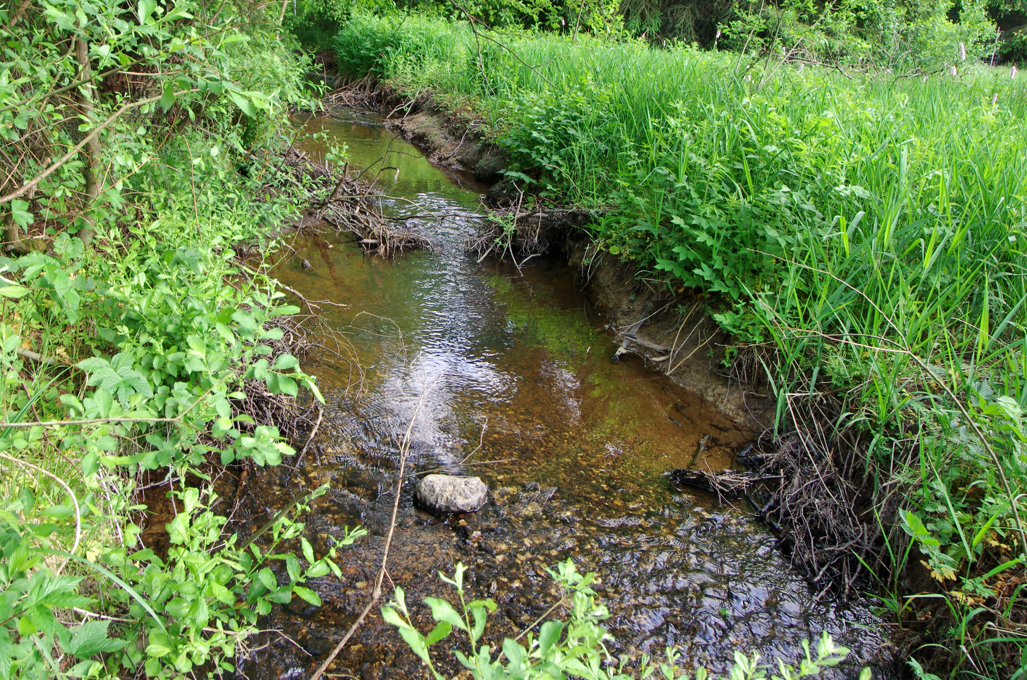 Újezdský potok (Mähringsbach), na česko-německé hranici u nejzápadnějšího bodu Česka, okres Cheb